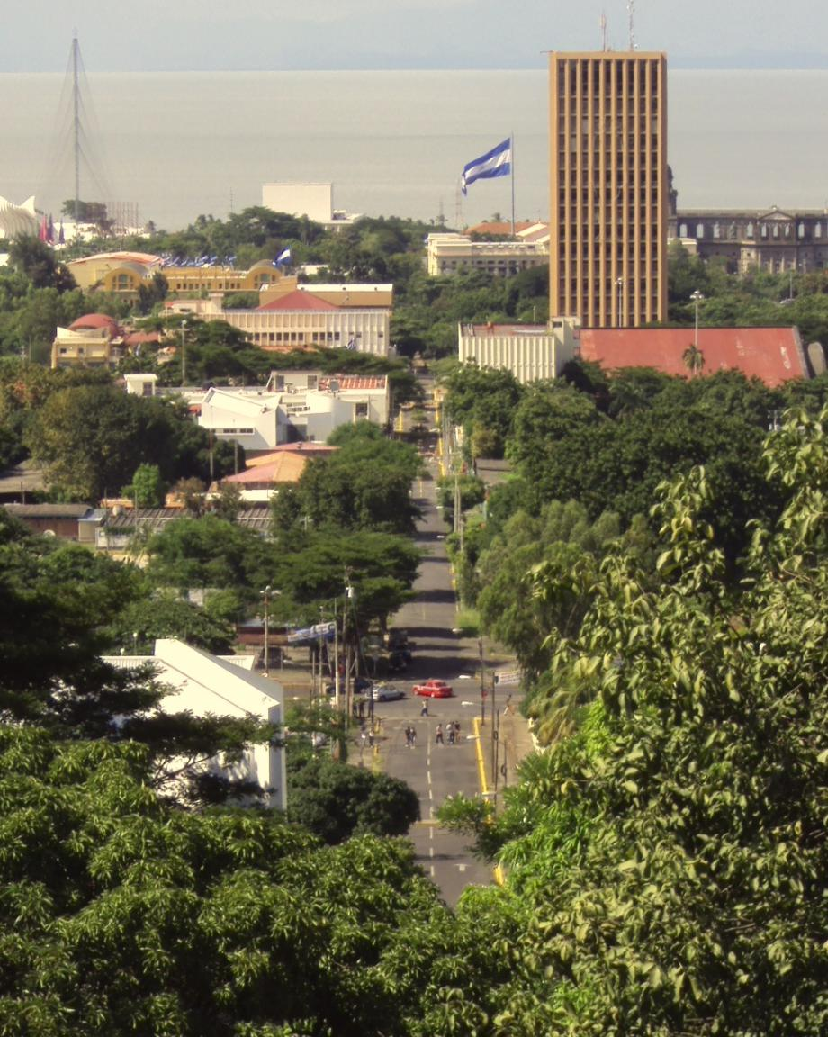 Antiguo casco de managua con edificios sobrevivientes al terremoto de 1972